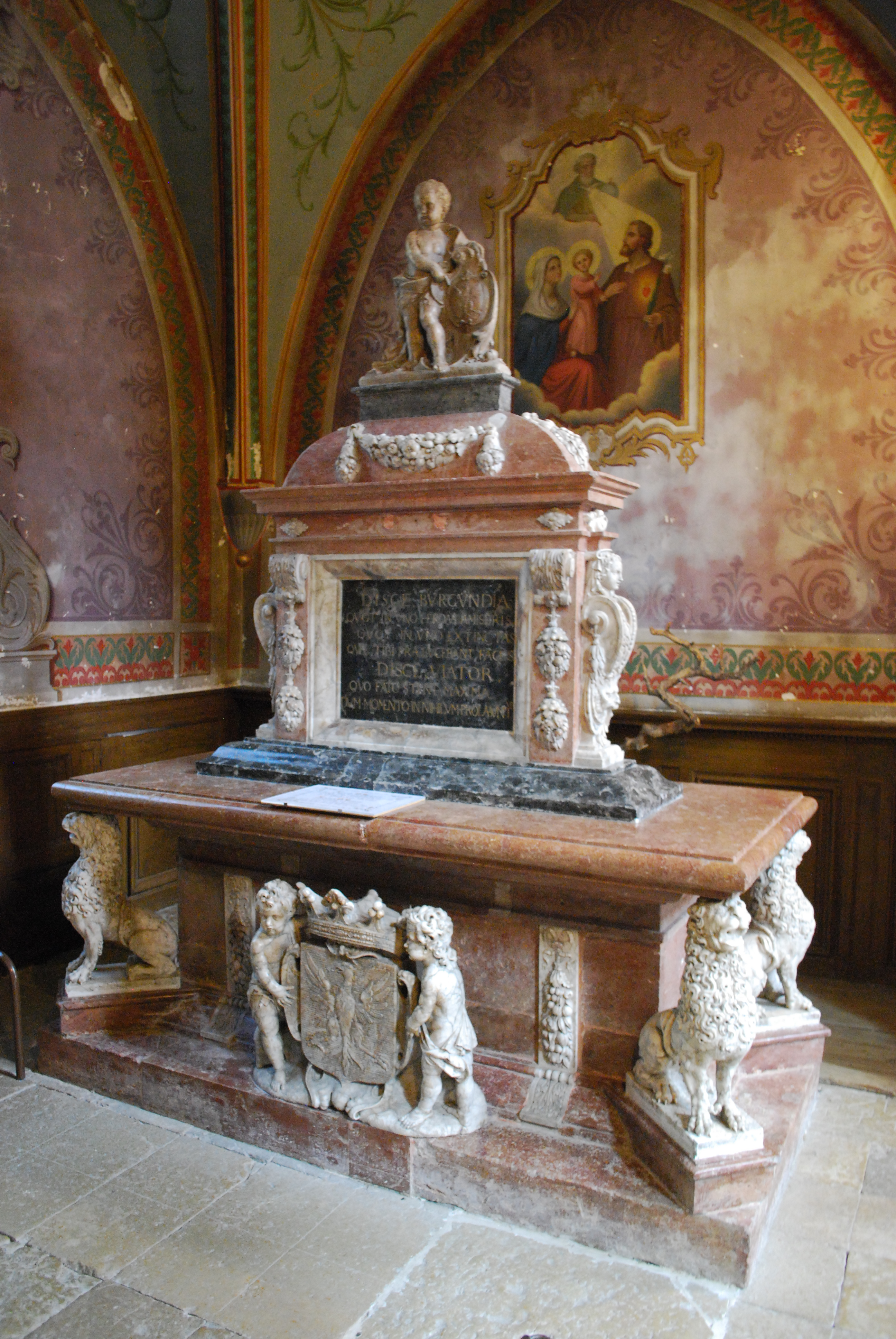 Mausolée du marquis de Varambon dans l'église de l'ancien monastère de Consolation .